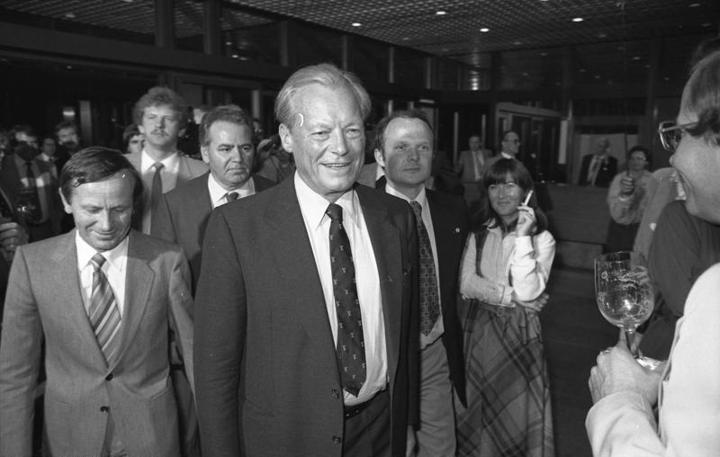 Bundestagswahl: Wahlparty im Bundeskanzleramt